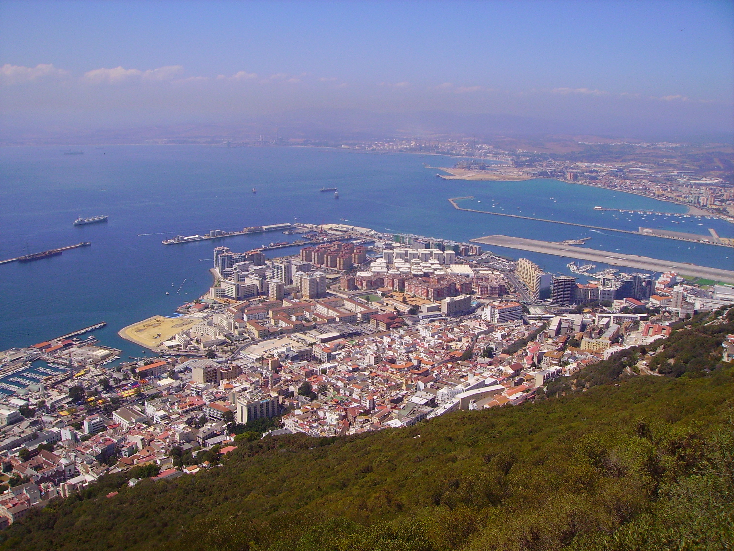 Pohled na Gibraltar z vyvýšeného místa - skály (the Rock)